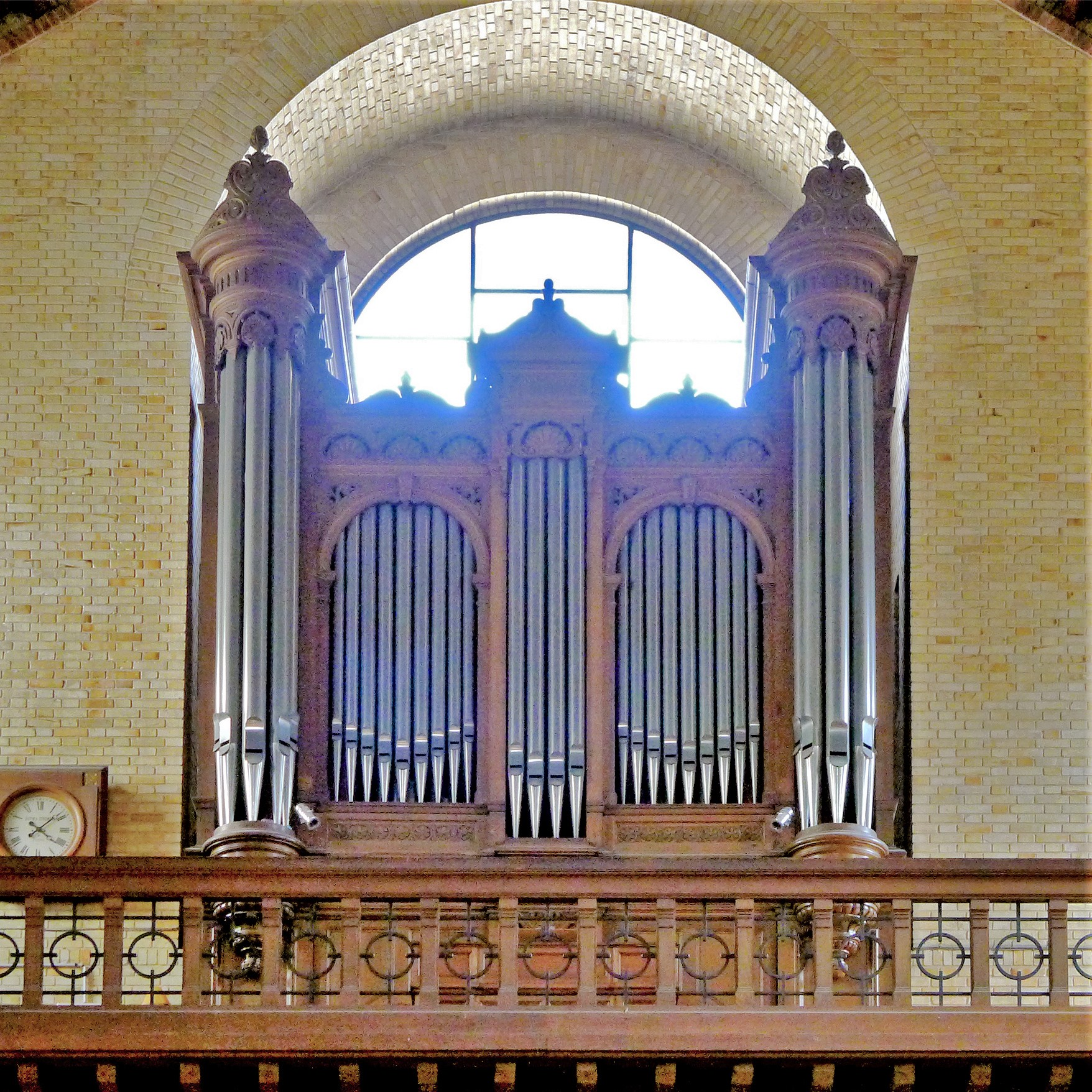 Église Notre-Dame-du-Rosaire (orgue de tribune) - Paris XV